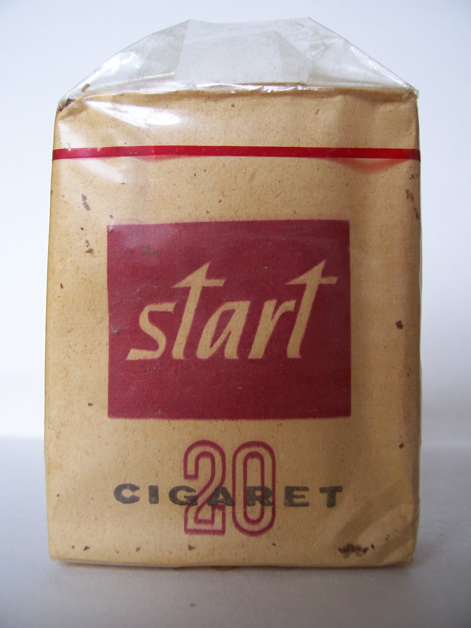 Cigarety Start bez filtru, 80. léta